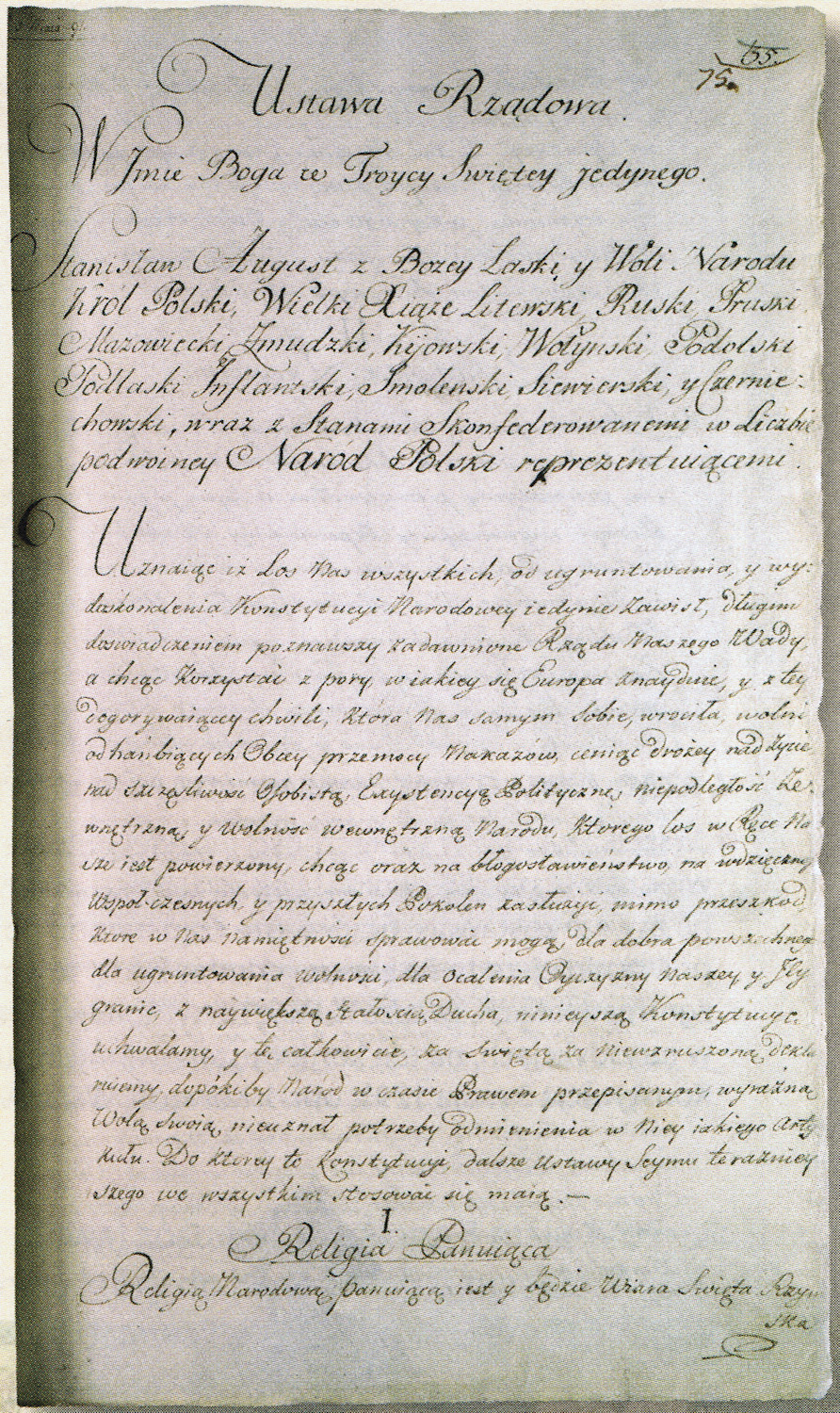 Rękopis Konstytucji 3 maja zawarty w Metryce Litewskiej